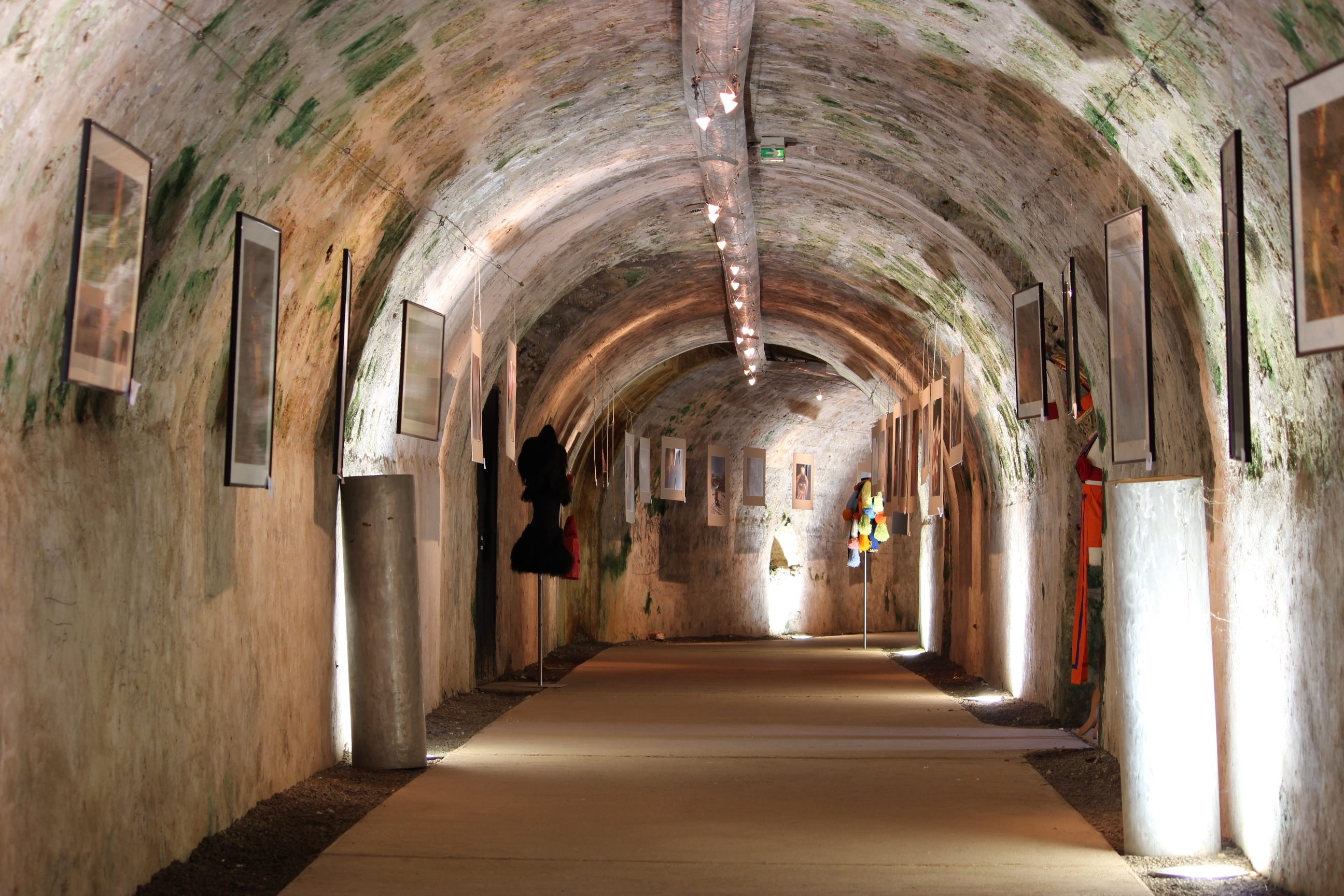 Fort Fleur d'épée (Inscrit) .